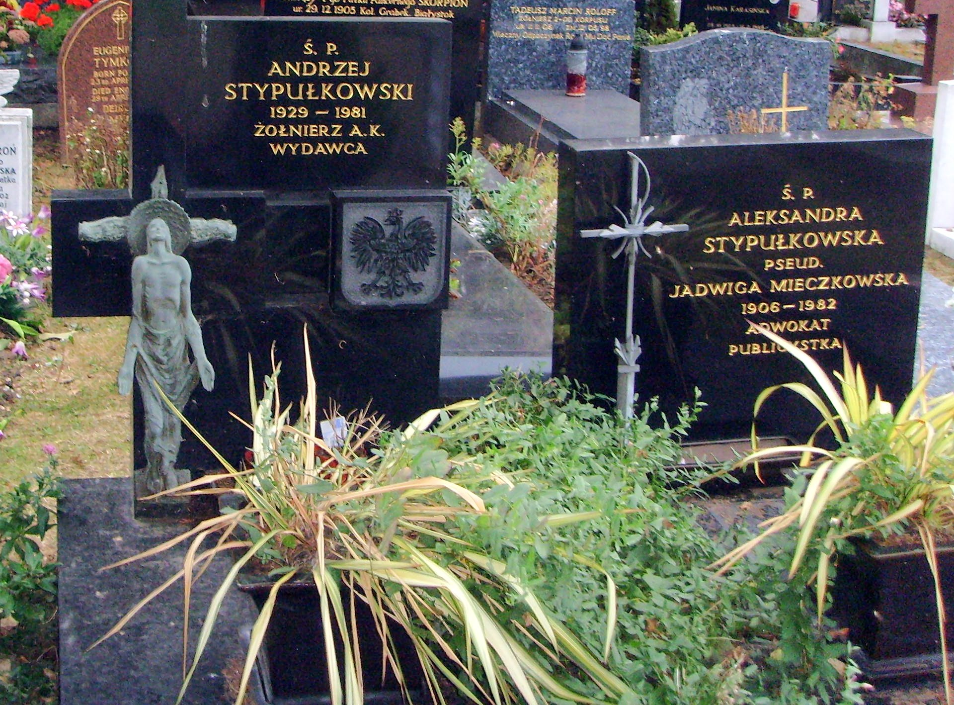 Grób Stypułkowskiego na Cmentarzu Gunnersbury w Londynie